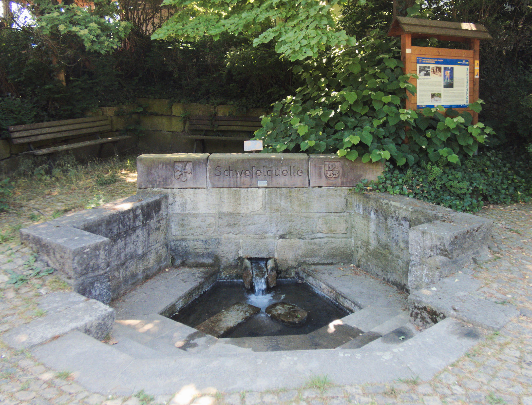 In der Ortslage von Bessingen tritt stark schwefelhaltiges Wasser zu Tage. Das Wasser der früher stinkender Born genannten Quelle gibt der anliegenden Straße den Namen und wurde von den Dorfbewohner als Trinkwasser und zu Heilzwecken bei Augenleiden genutzt. Der Quellbereich wurde erstmals 1941, zuletzt 1985 in Stein gefasst.